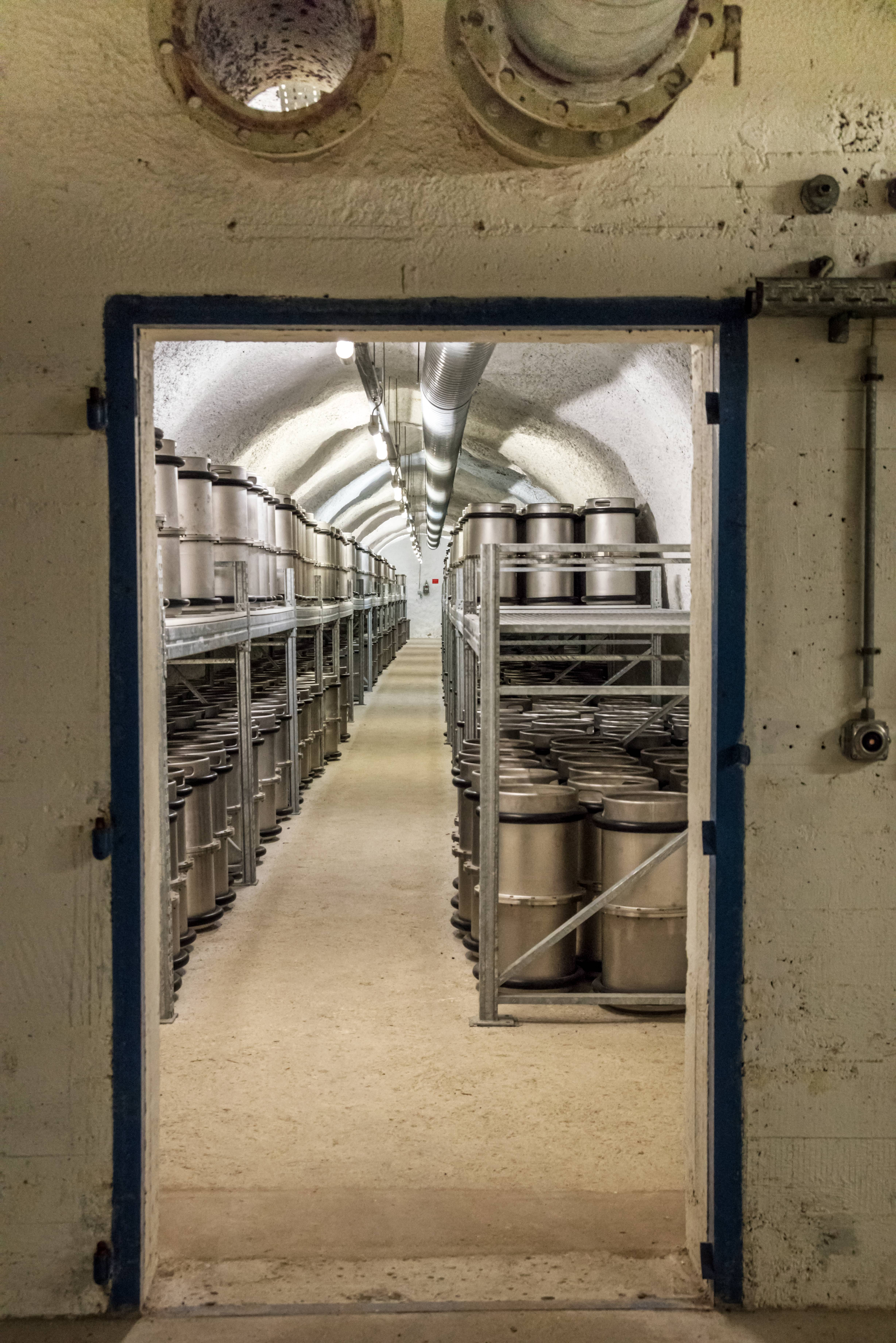 Der Barbarastollen ist der Zentrale Bergungsort der Bundesrepublik Deutschland zur Lagerung von fotografisch archivierten Dokumenten mit hoher national- oder kulturhistorischer Bedeutung. Er ist in Europa das größte Archiv zur Langzeitarchivierung. Die Bilder sind im Rahmen einer Führung des Bundesamts für Bevölkerungsschutz und Katastrophenhilfe (BBK) entstanden - Wikipedia Stammtisch,das 113. Treffen am 30. Mai 2016 Blick in den Lagerraum A der nahezu gefüllt ist. Links hinten sind die Behälter der Subduktive Maßnahmen ZBO - SdM 052004